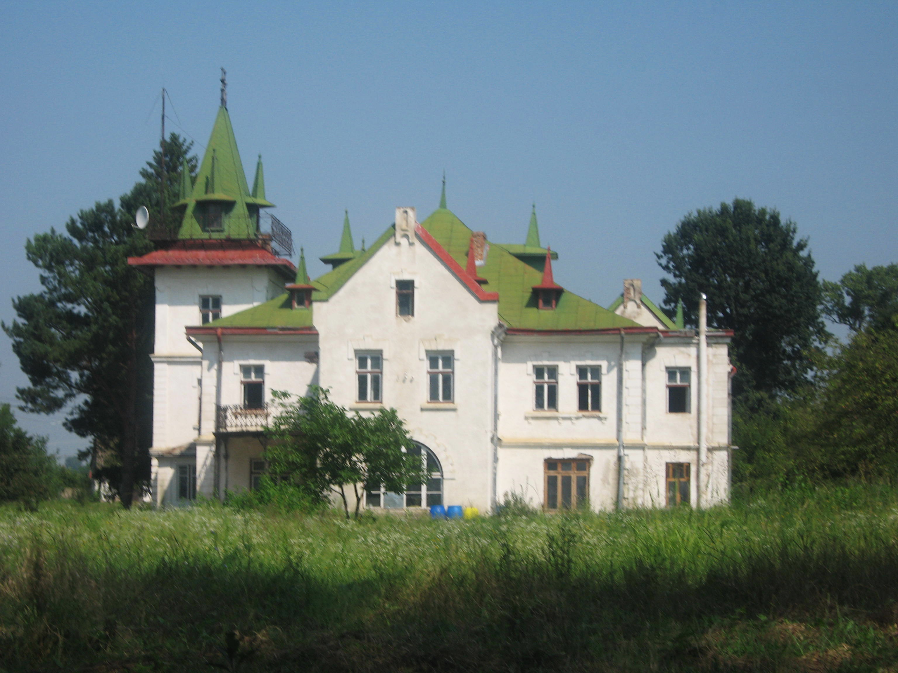 Conacul Sturdza din Salcea, Suceava County, Romania